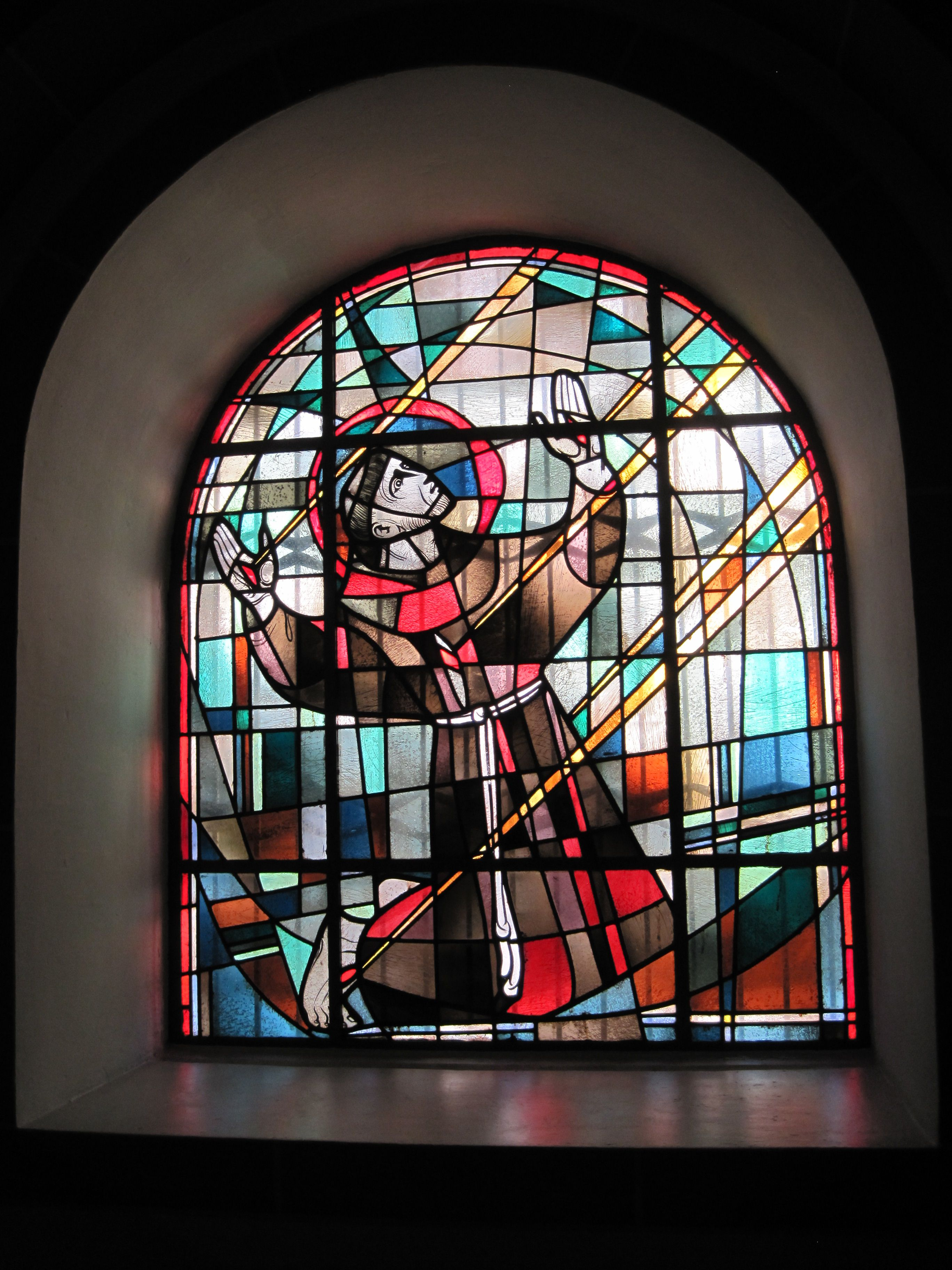 Das Foto zeigt ein Fenster in der Vorhalle der St. Agnes-Kirche in Hamm, das den Heiligen Franziskus darstellt.